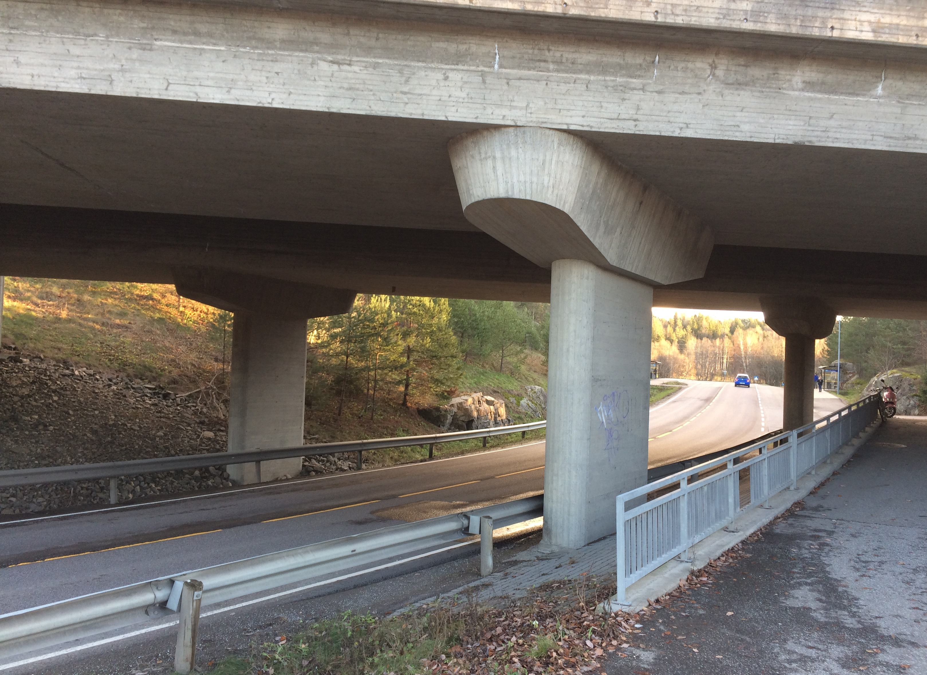 Osloveien (fylkesvei 311) i undergangen ved Kambo stasjon